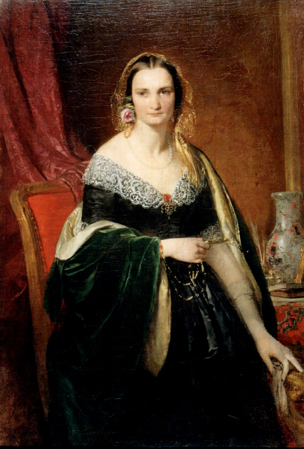 Елизавета Николаевна Кривцова, урожденная княжна Репнина-Волконская (1817-1855),дочь Николая Григорьевича Волконского, с 1837 года жена камергера Павла Ивановича Кривцова (1806-1844).